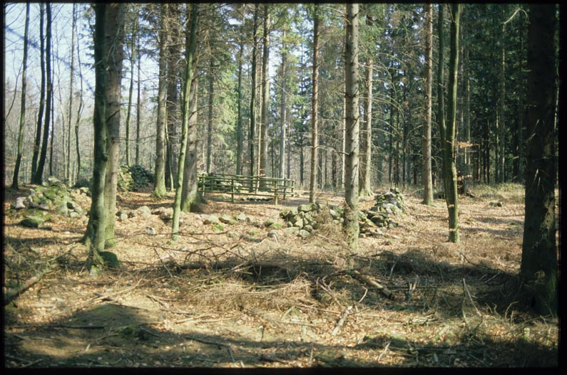 Östra Ljungby 2:1. Fångstgrop, närmast rektangulär, 3x4 m (NV-SÖ) och 1.4 m dj. Fångstgropen är rensad samt omges av ett trästaket. Motiv: Östra Ljungby 2:1 Kategori: Fångstgrop, Skogslandskap Östra Ljungby 2:1. Fångstgrop, närmast rektangulär, 3x4 m (NV-SÖ) och 1.4 m dj. Fångstgropen är rensad samt omges av ett trästaket. Östra Ljungby 2:1.